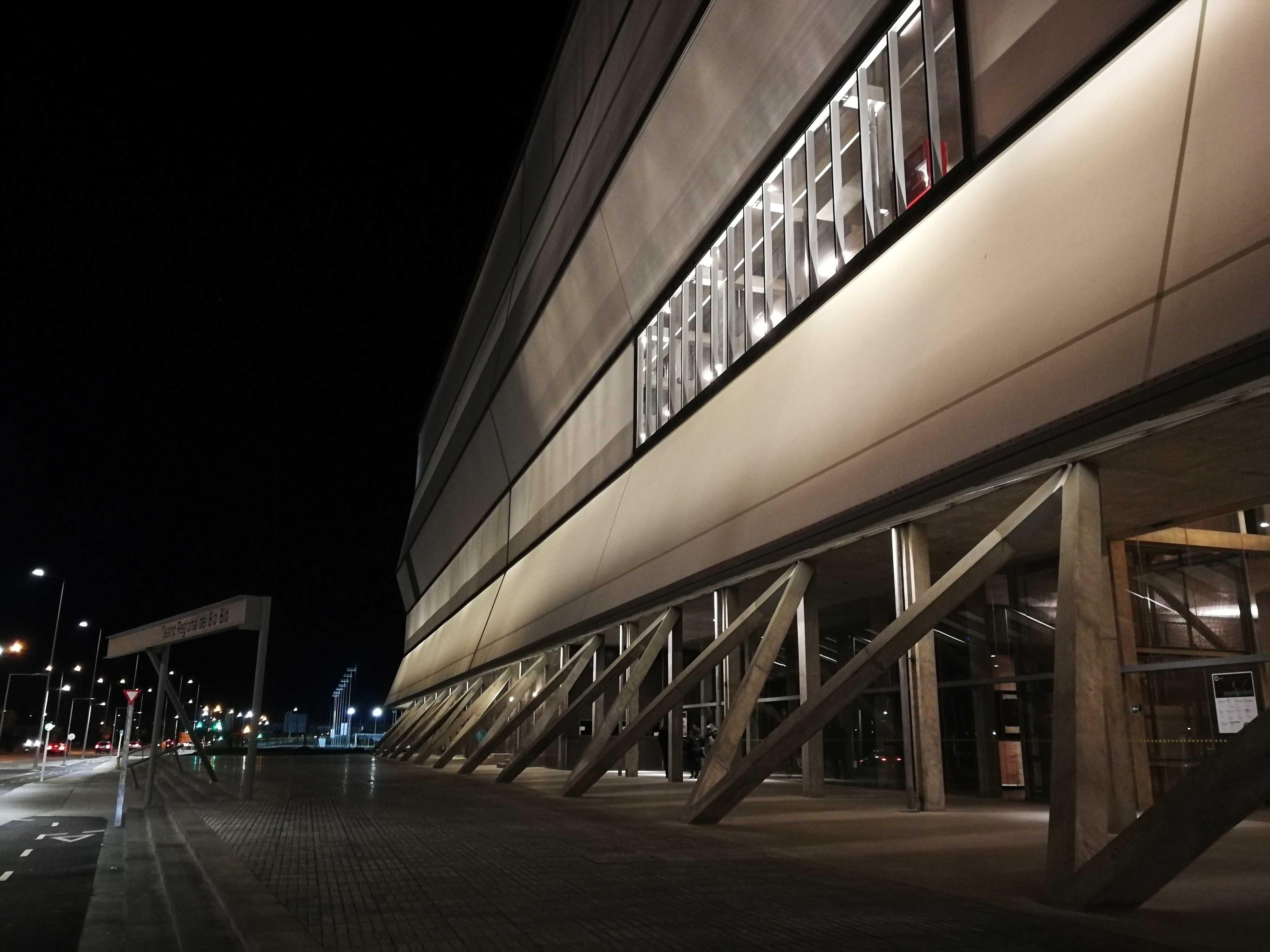 Teatro Regional del Biobío, Concepción, Chile.